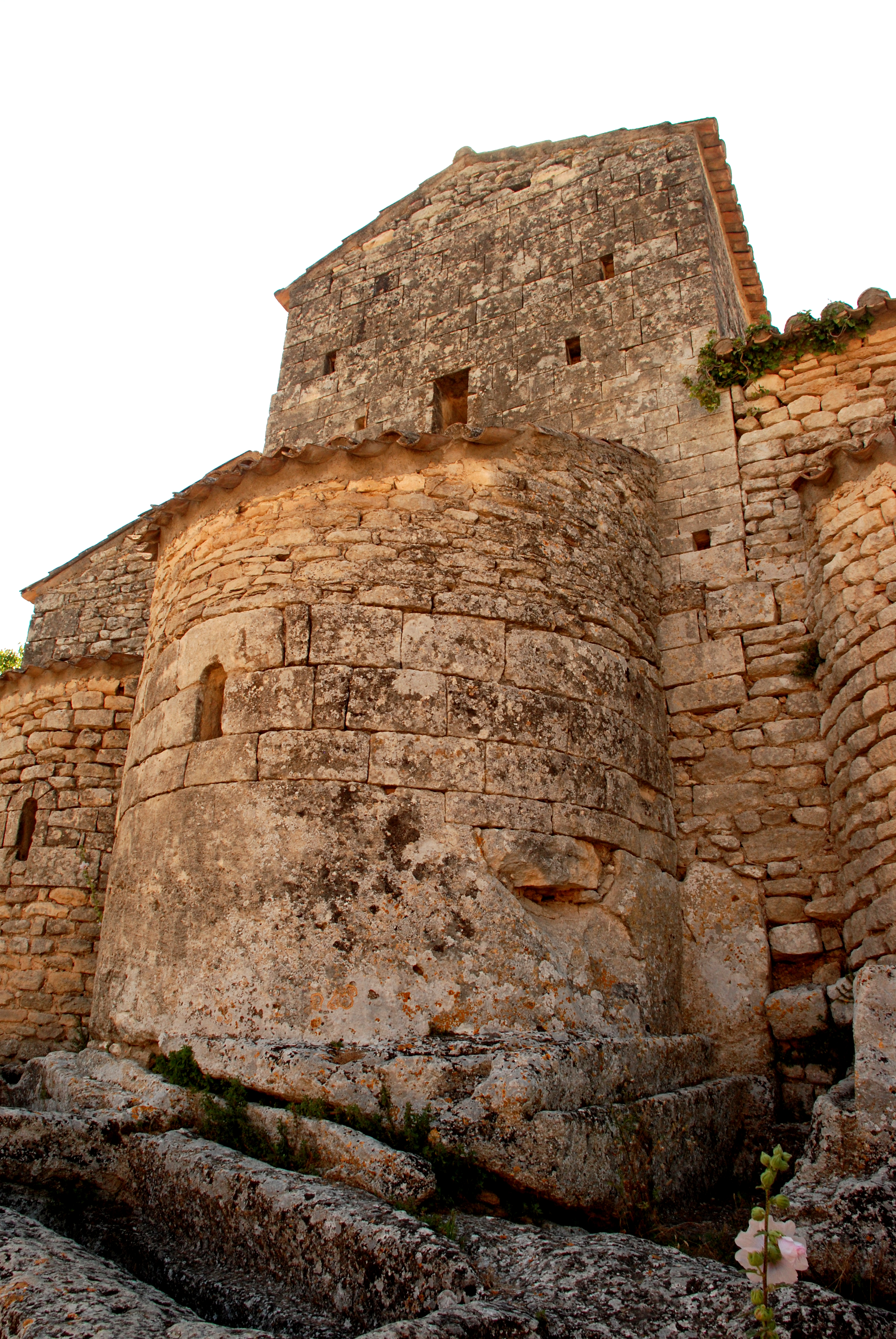 France - Provence - Vaucluse - Luberon - Église de Saint-Pantaléon